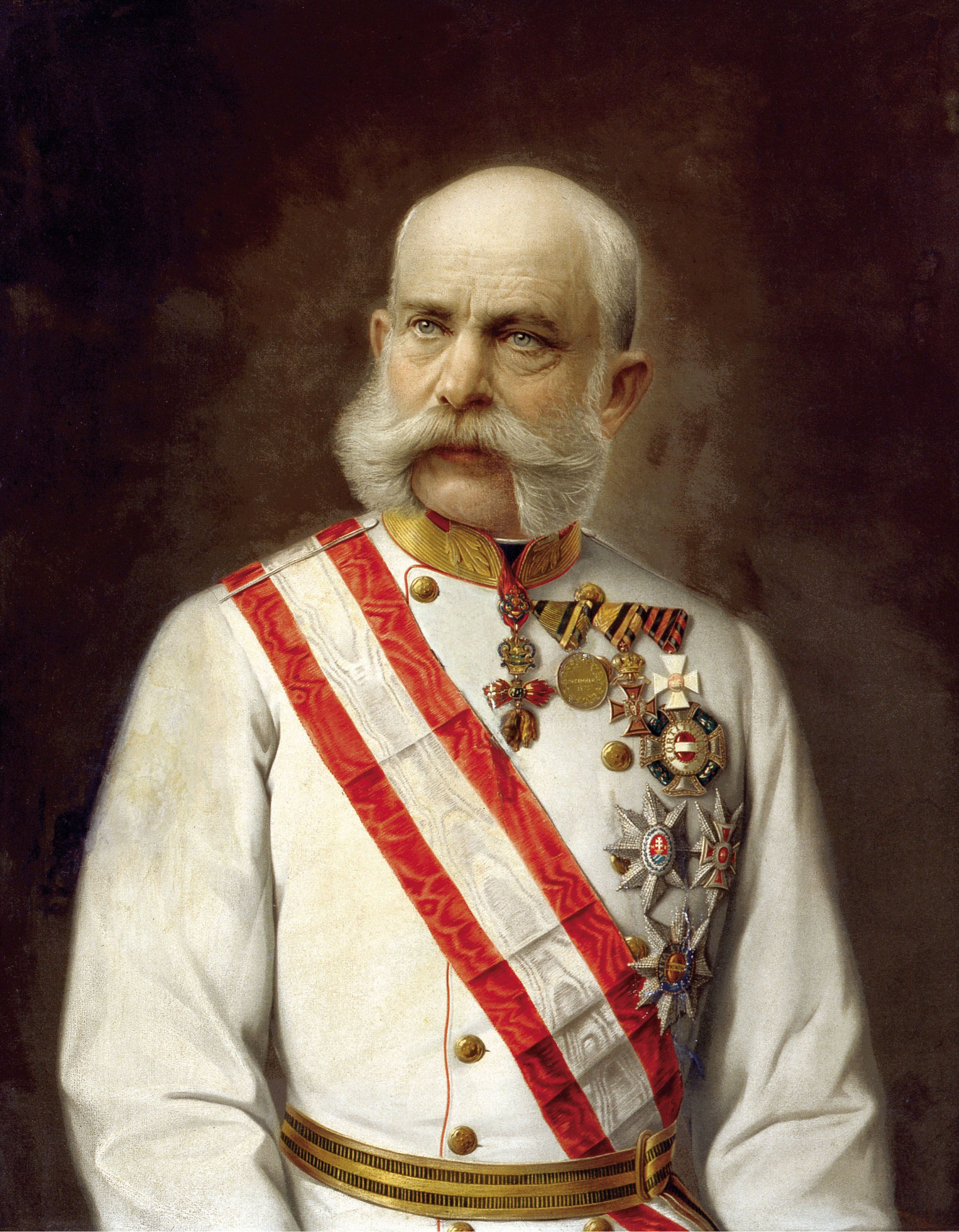 Kaiser Franz Joseph, um 1910, Ölgemälde; Bundesmobilienverwaltung